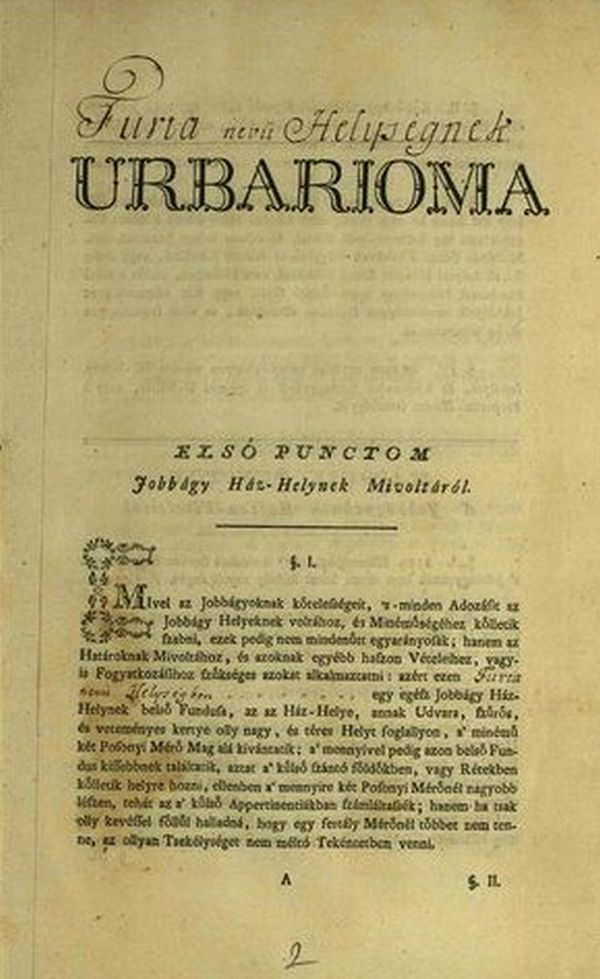 Furta Mária Terézia által 1767-ben elrendelt úrbérrendezés során készített urbáriumának címlapja (1770).